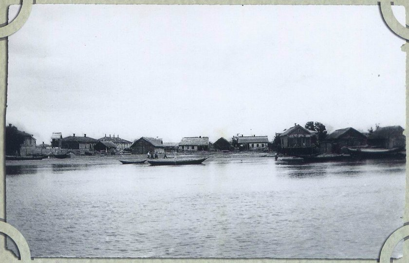 Вид на станицу Гниловская с реки